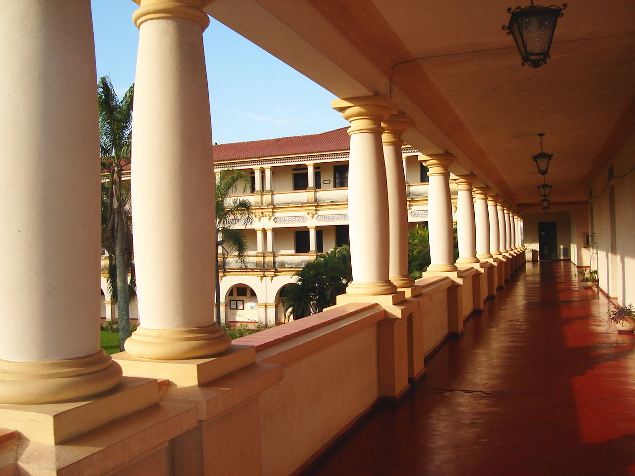 Corredores do P1, UFRRJ